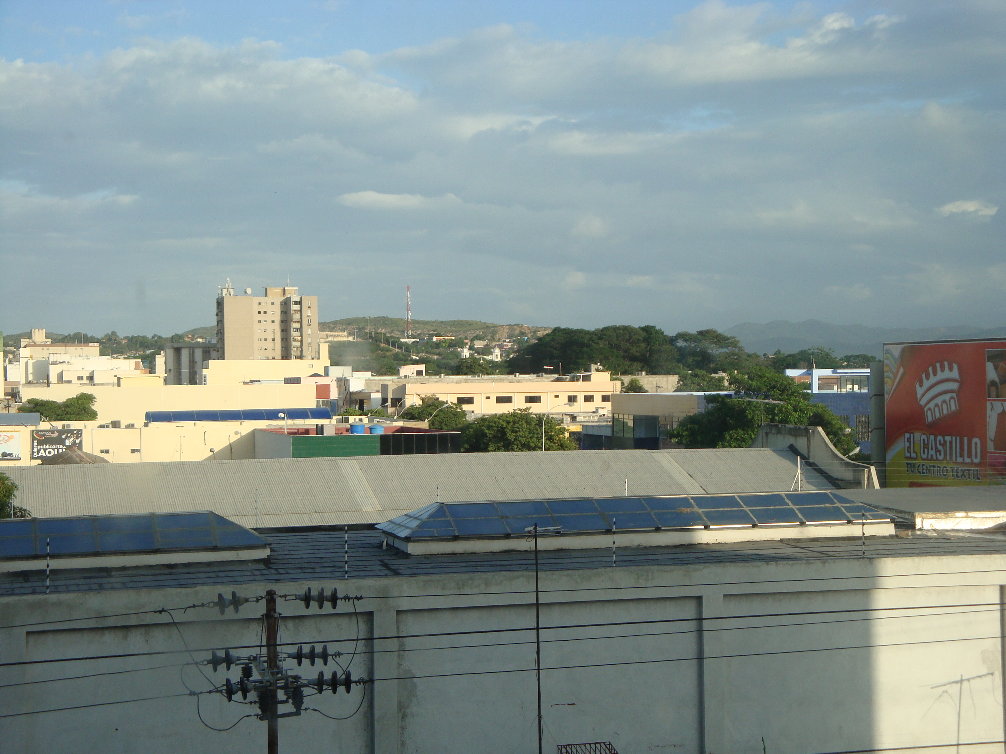 Centro de Cumaná, desde el C.C. Cumaná Plaza